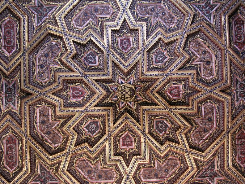 Artesonado del techo de la Sala del Tesoro de la Catedral de Toledo, España.